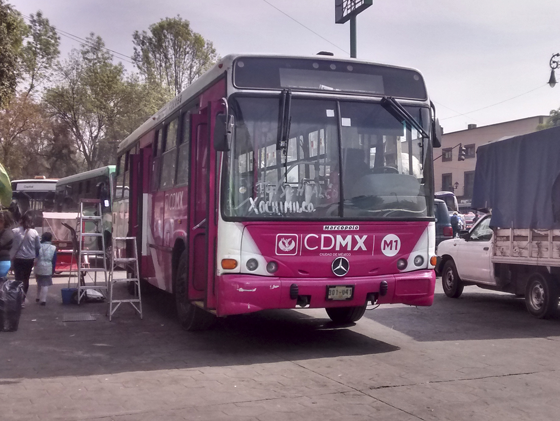 Un Marcopolo Torino Atenea en el C.C. Xochimilco en la ruta 142